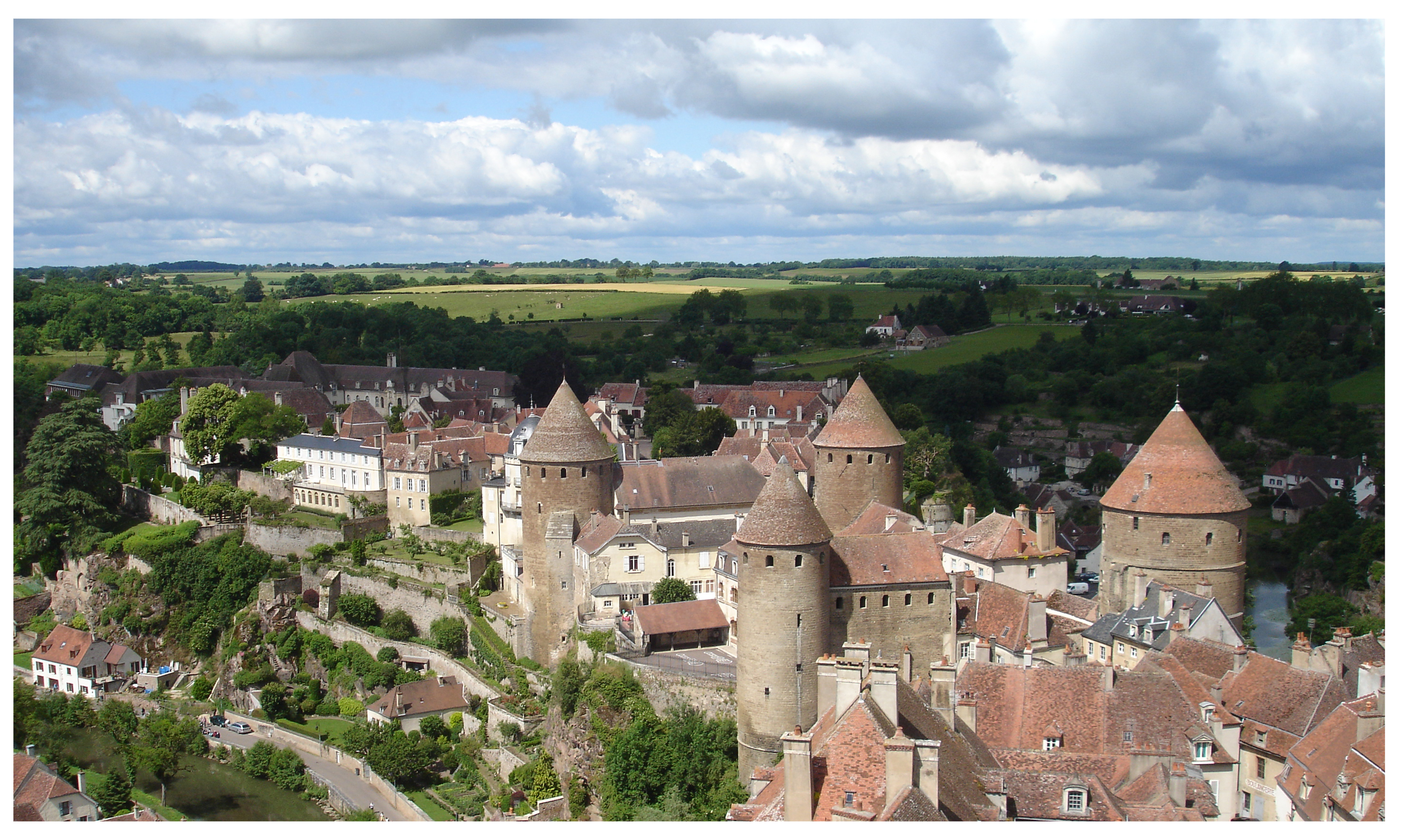 Donjon de Semur-en-Auxois, encerclé par la rivière de l'Armançon.